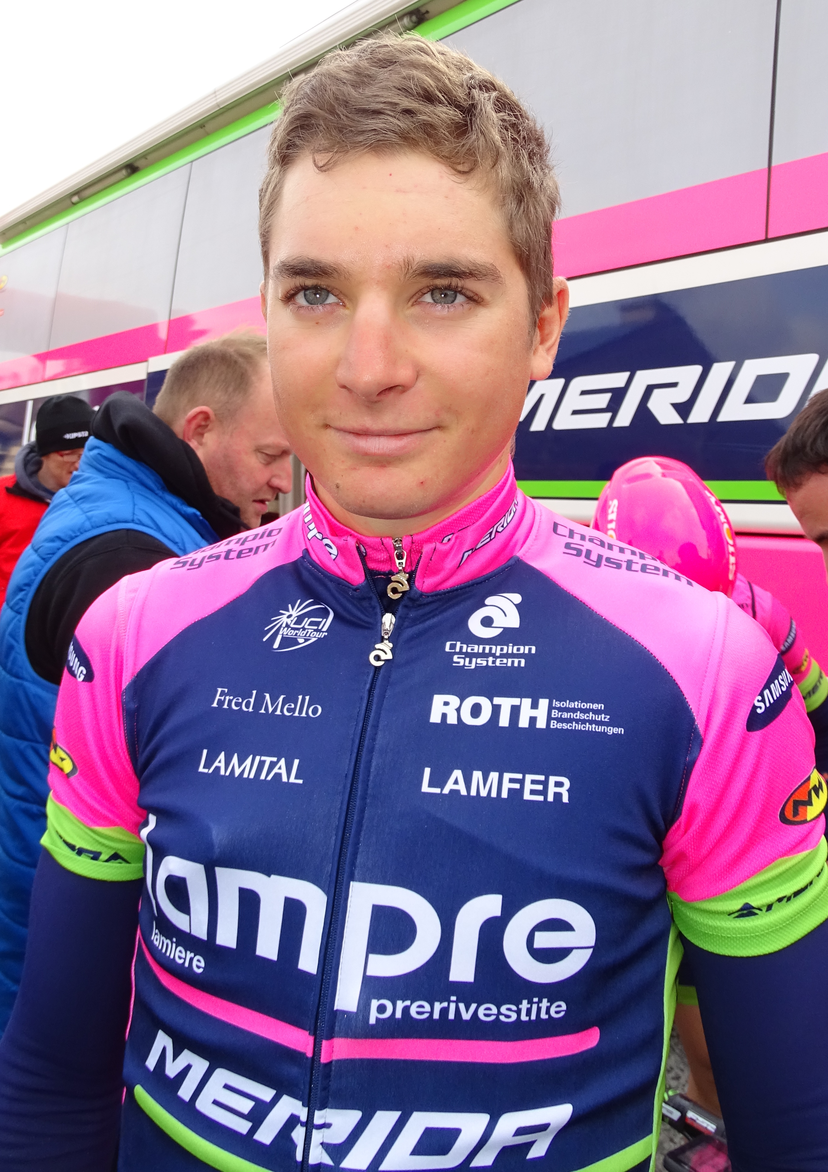 Reportage réalisé le vendredi 27 mars à l'occasion du départ et de l'arrivée du Grand Prix E3 2015 à Harelbeke, Belgique.